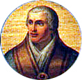 Pope Adrian V. / Past Hadrian V.